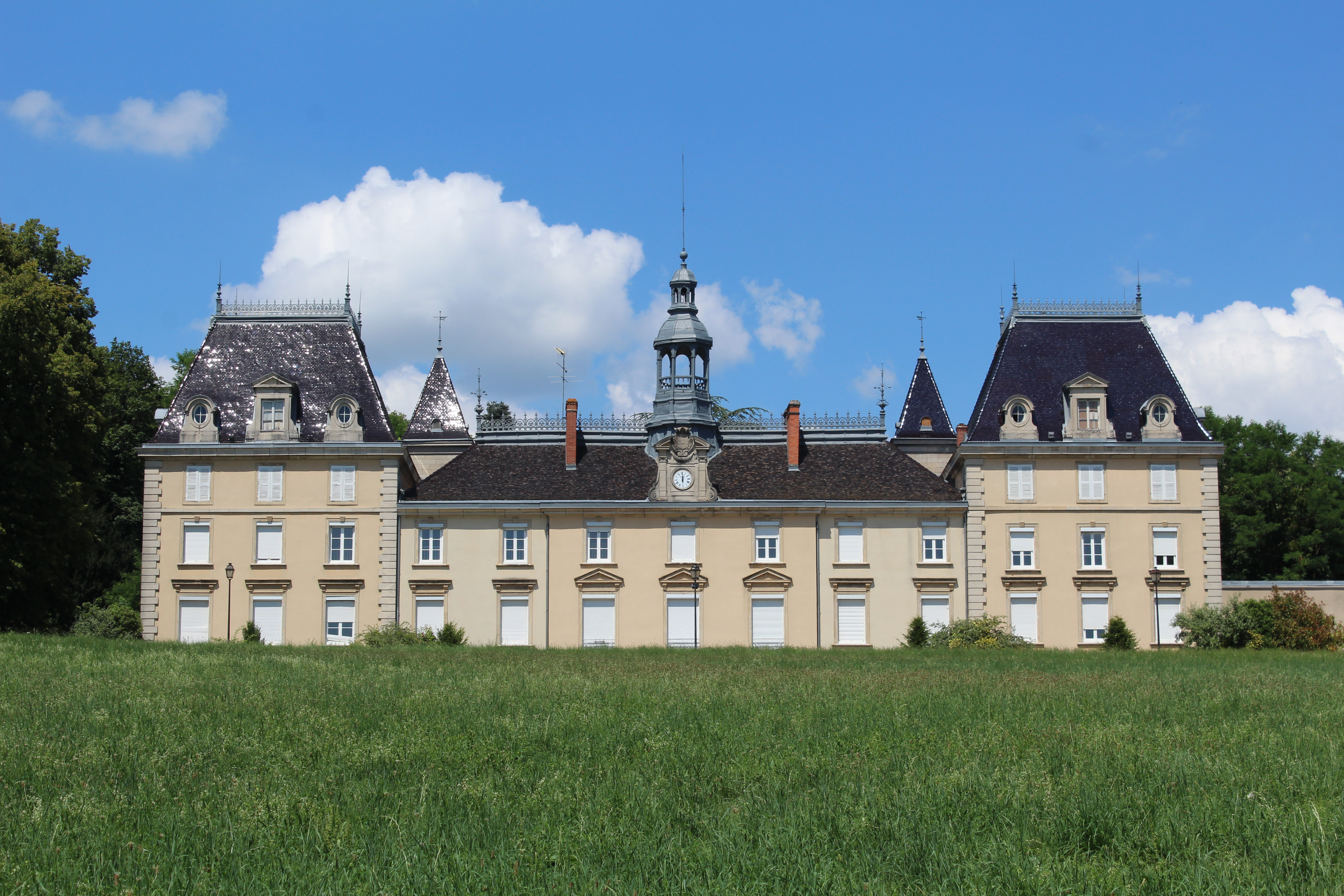 Château Saint-Jean dans la commune associée de Saint-Jean-le-Priche.